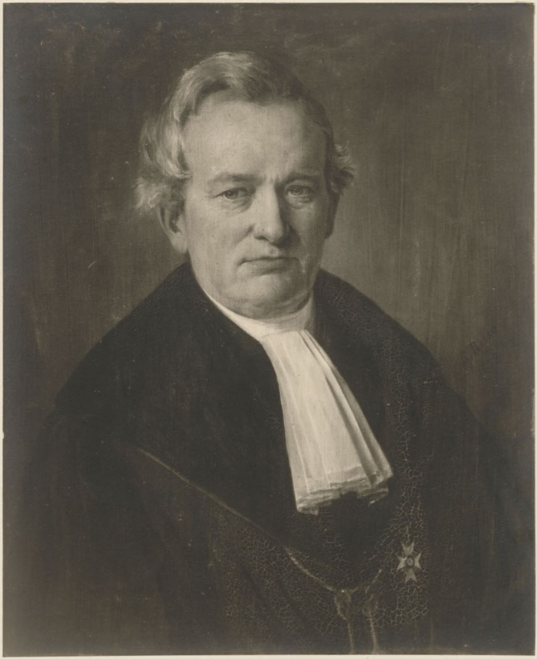 Carl Weizsäcker (1822 - 1899), deutscher ev. Theologe und Kirchenhistoriker, 1847-1848 Stiftsrepetent und PDoz. in Tübingen, 1861-1899 o. Prof. für Kirchengeschichte (ev.), 1867/68 und 1877/78 Rektor, 1889-1899 Kanzler.